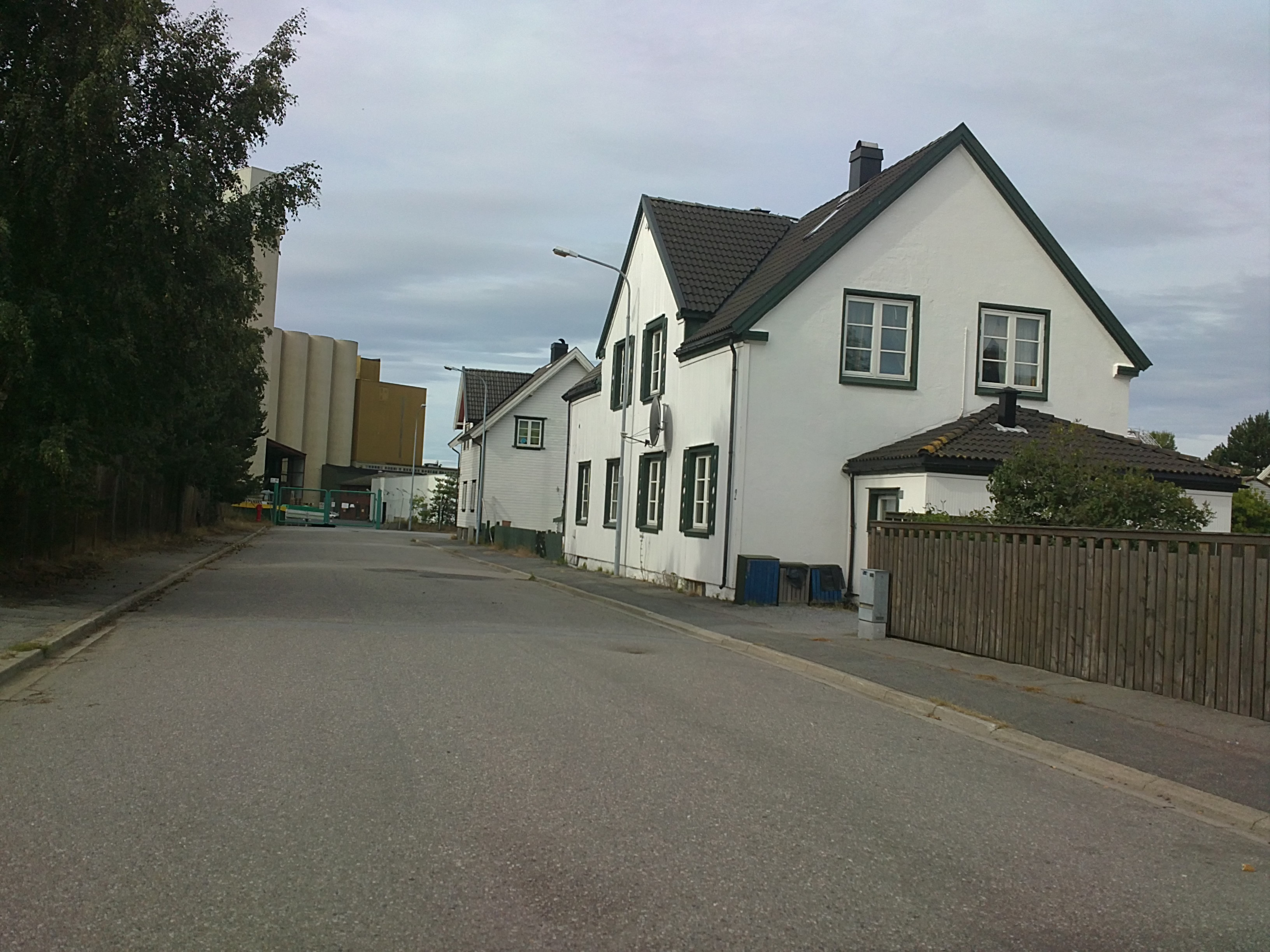 Bilde av Bredsdroffs gate på Torstrand, Larvik